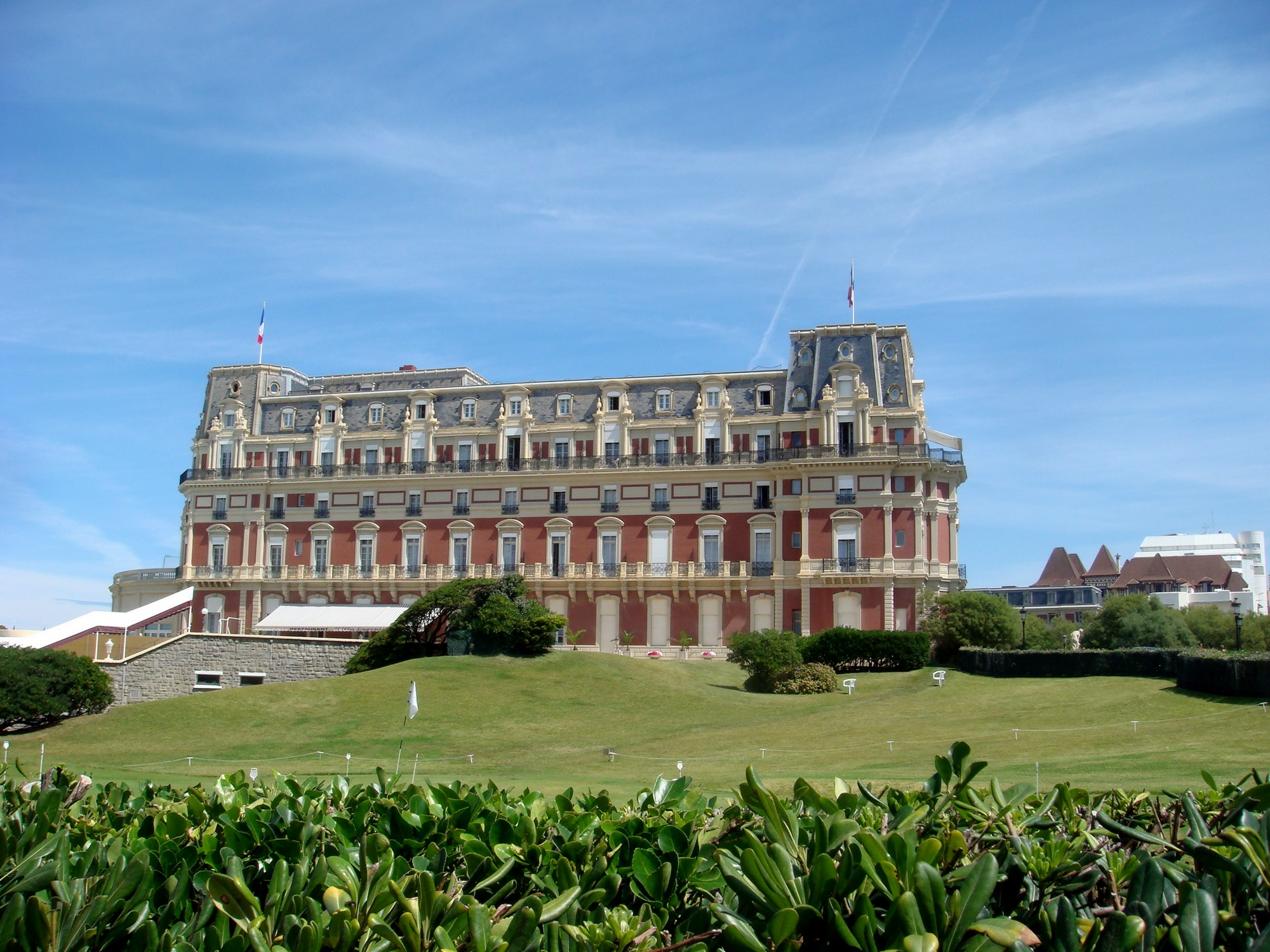 L'Hôtel du Palais de Biarritz (ancienne villa impériale)